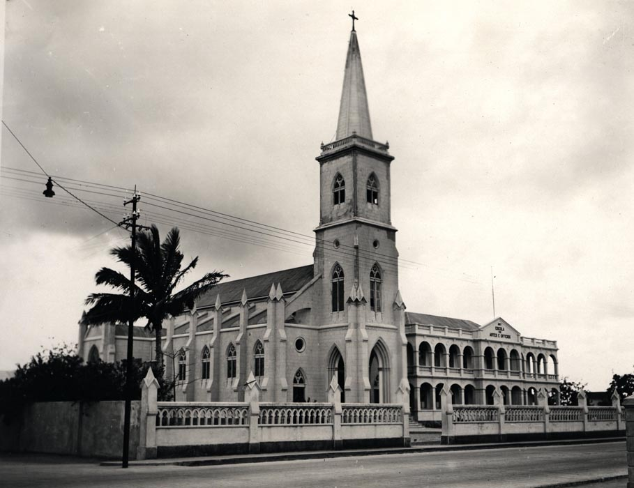 Igreja de Nª Sª do Rosário, situada na Av. da República, inaugurada, em 1925, pelo Bispo de Augusta e Prelado de Moçambique, antigo missionário franciscano que esteve ligado ao início da sua construção. A Escola de Artes e Ofícios para indígenas, construída sob a orientação de missionários franciscanos, foi inaugurada, em 1907, aquando da visita do Príncipe D. Luís Filipe, tendo sofrendo várias ampliações, praticamente até ao final do período da concessão. Dotada de grande variedade de oficinas - serralharia, carpintaria, alfaiataria, sapataria, encadernação, tipografia -, esta escola constituiu um dos principais pólos de formação profissional dos indígenas.